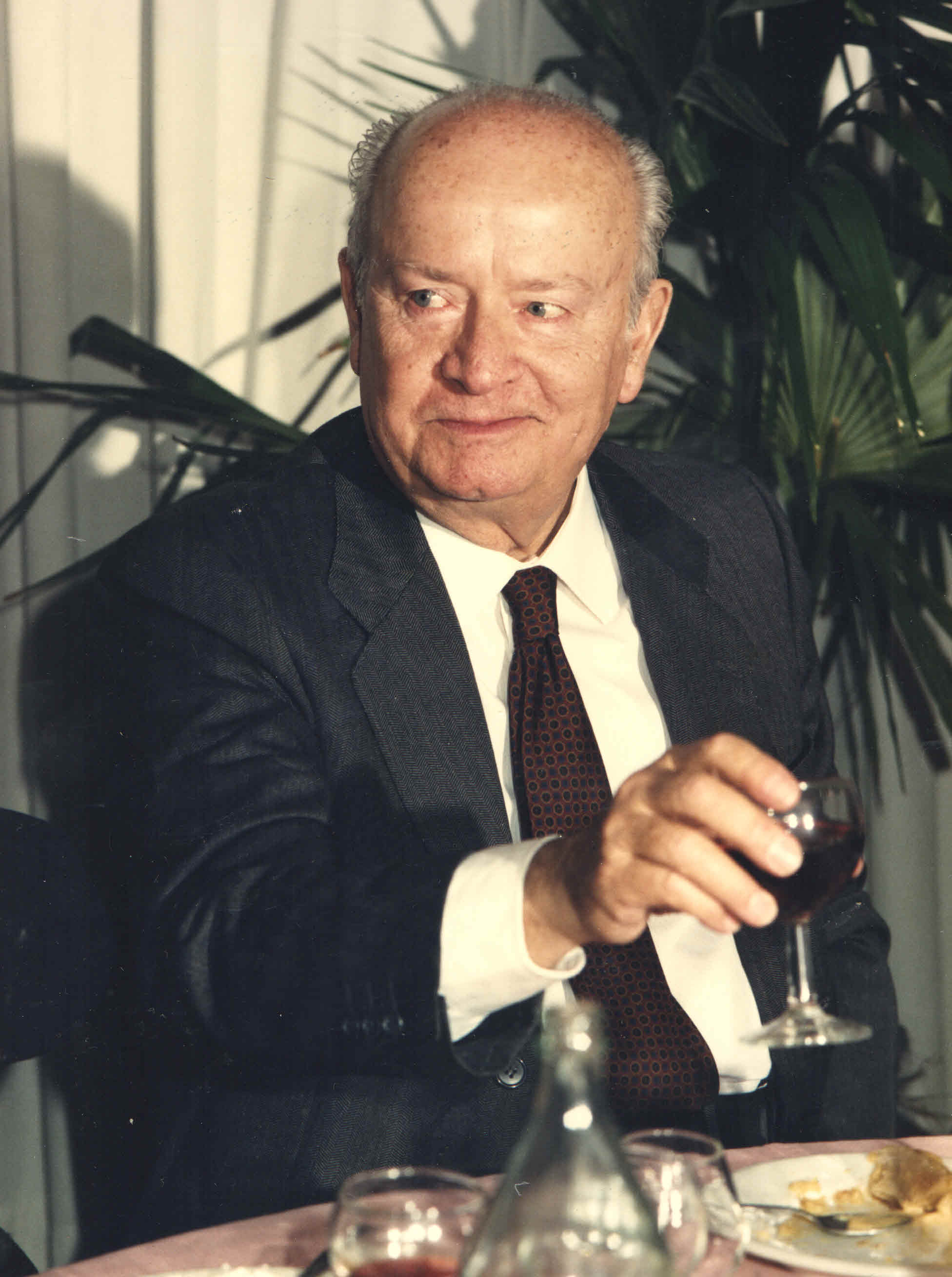 José Ortega Spottorno (1988)